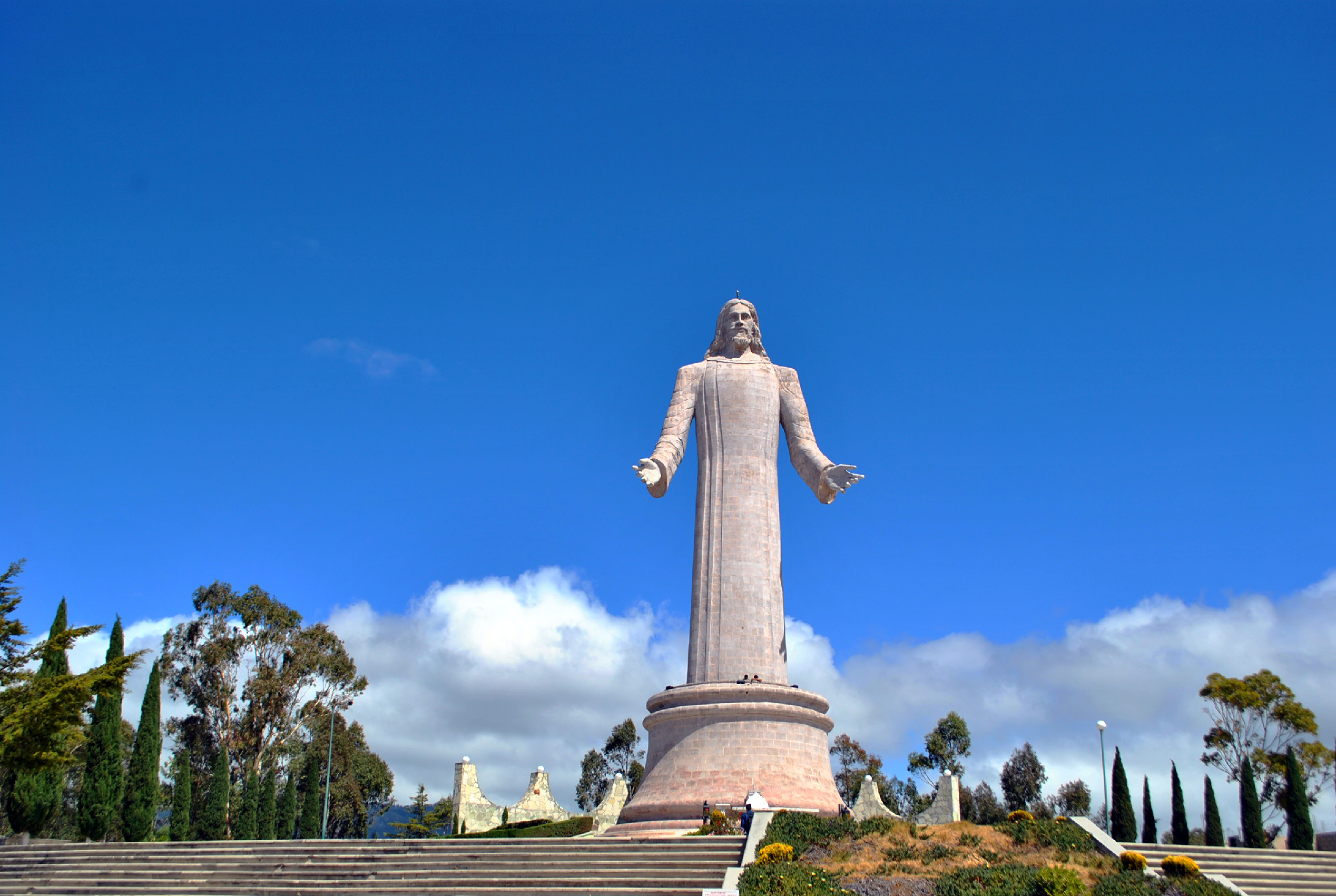 Cerro de Santa Apolonia en donde se encuentra la escultura a Cristo Rey en Pachuca de Soto